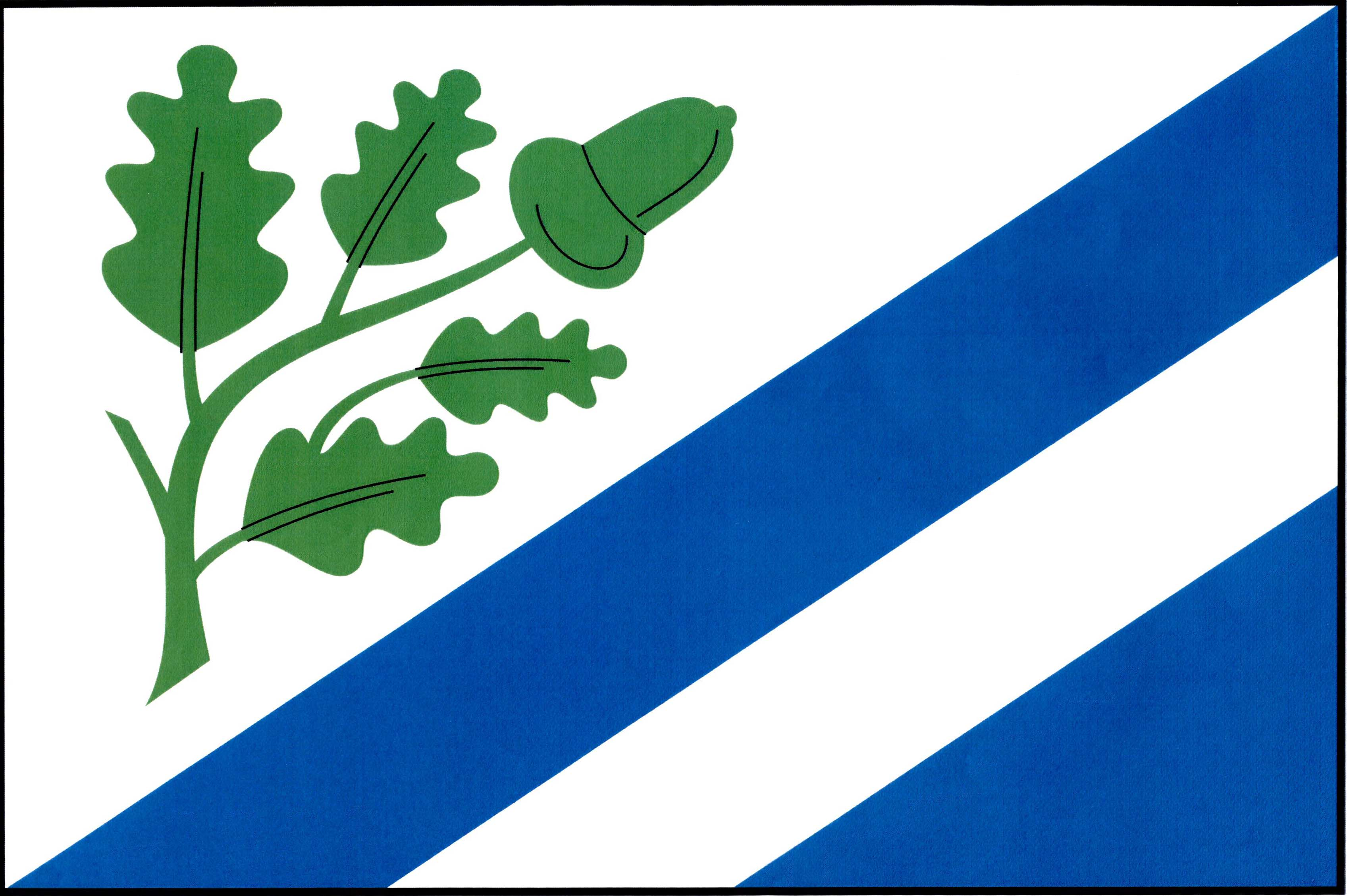 Vlajka obce Hvozdnice (okres Hradec Králové)